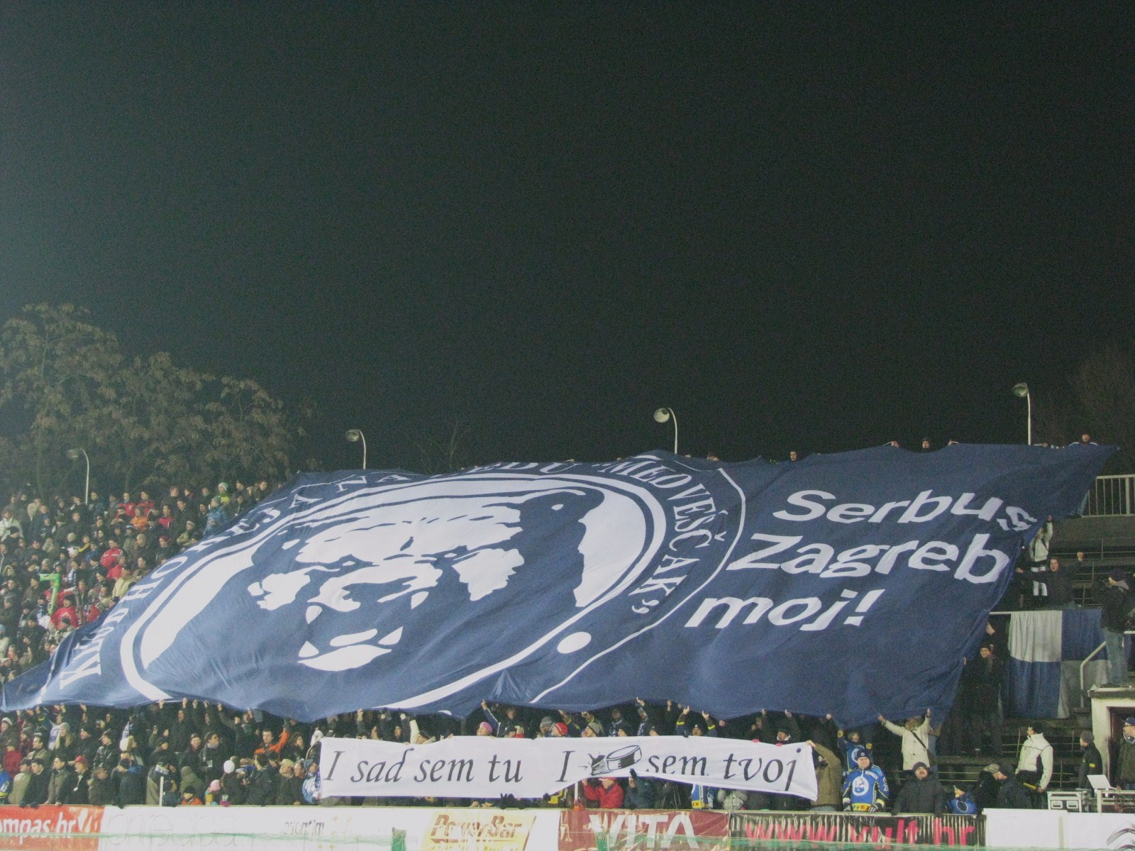 Medveščak Šalata Winter Classic